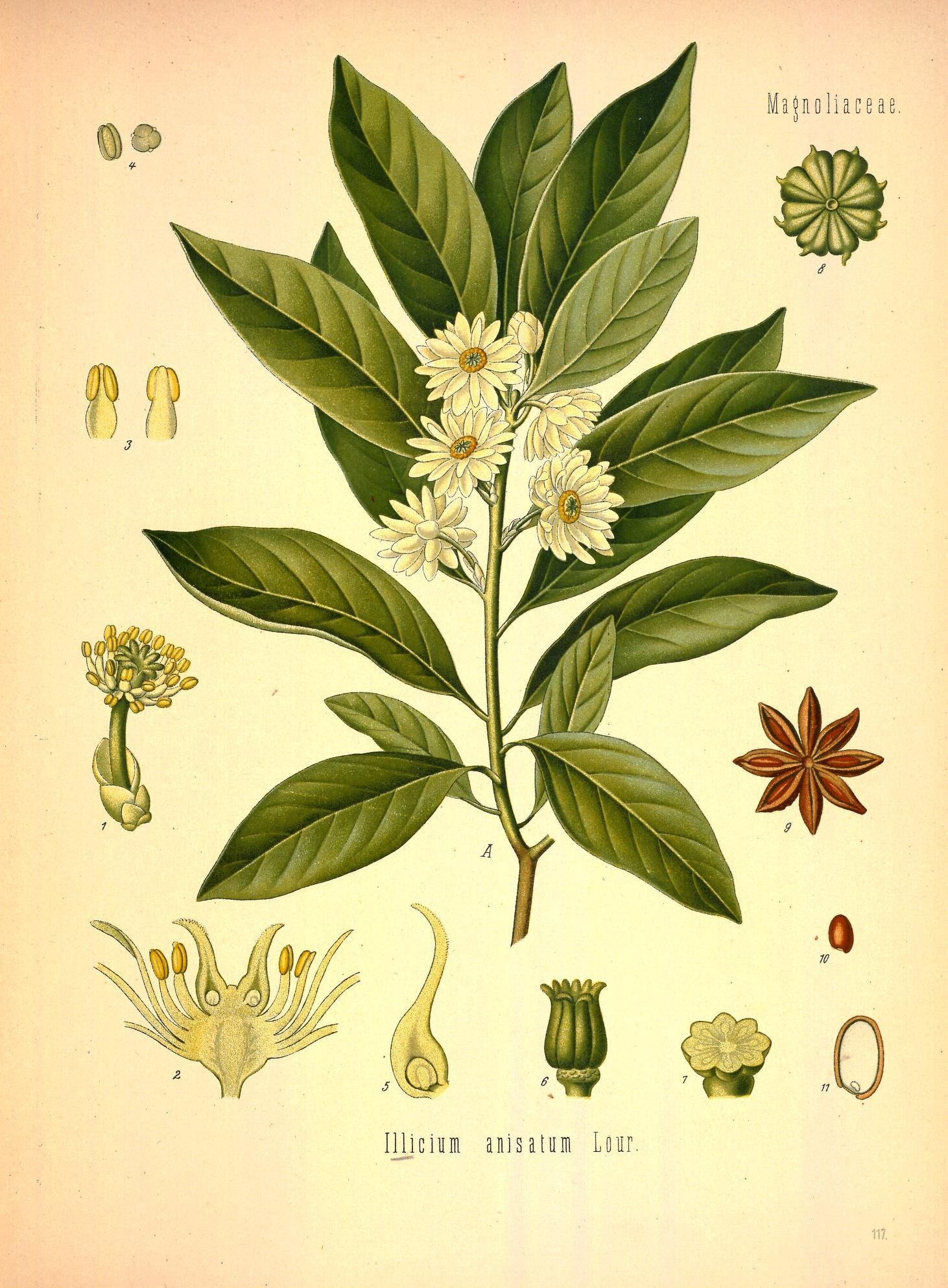 Japanischer Sternanis. A Blühender Zweig, nat. Grösse; 1 Blüthe ohne Kelch und Krone, vergrössert; 2 Blüthe im Längsschnitt, desgl.; 3 Staubgefässe von verschiedenen Seiten, desgl.; 4 Pollen, desgl.; 5 ein Carpell im Längsschnitt, desgl.; 6 Stempel, desgl.; 7 derselbe im Querschnitt, desgl.; 8 junge Frucht, nat. Grösse; 9 reife Frucht, aufgesprungen, desgl.; 10 Same, desgl.; 11 derselbe im Längsschnitt, vergrössert.